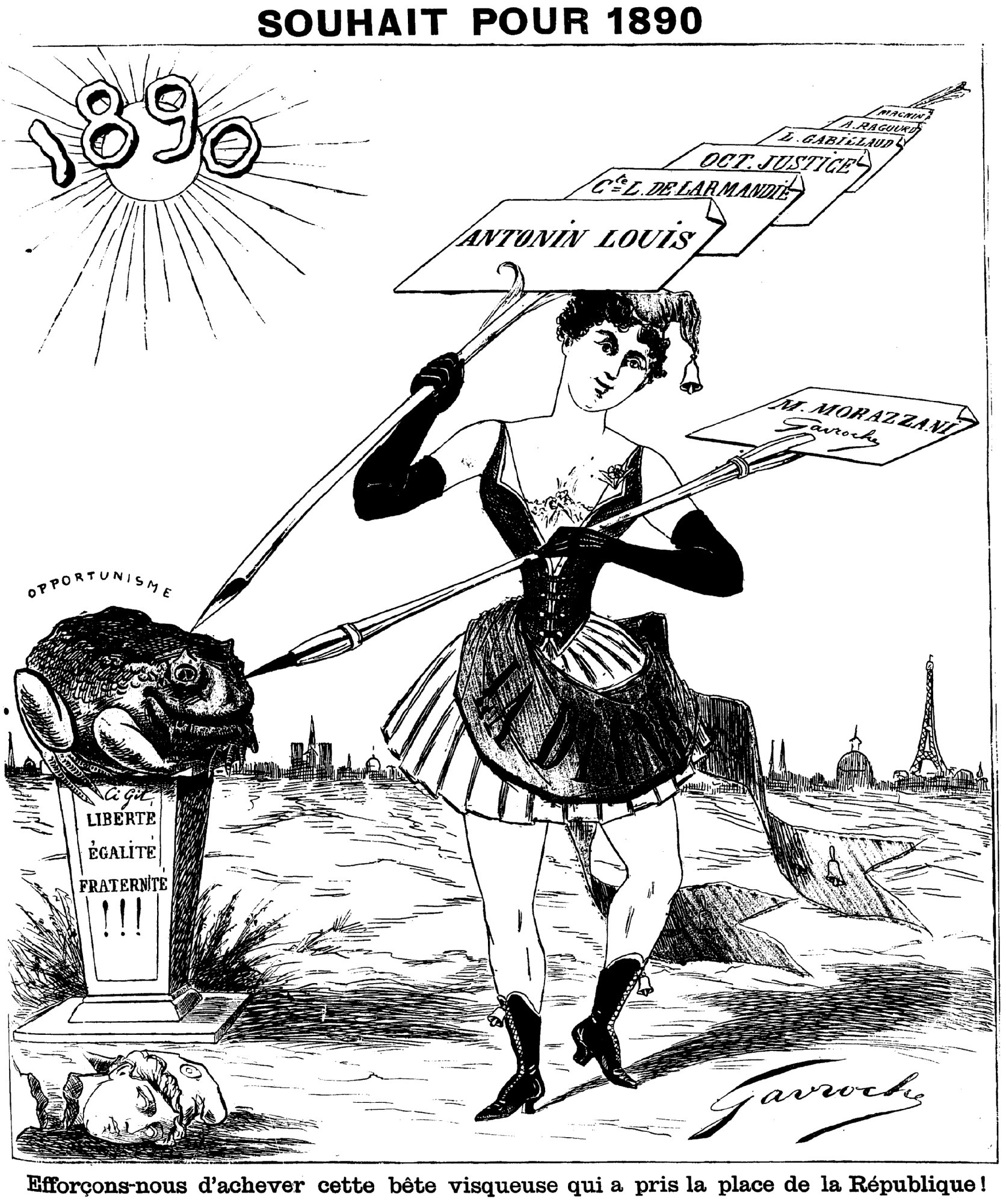 "Souhait pour 1890".